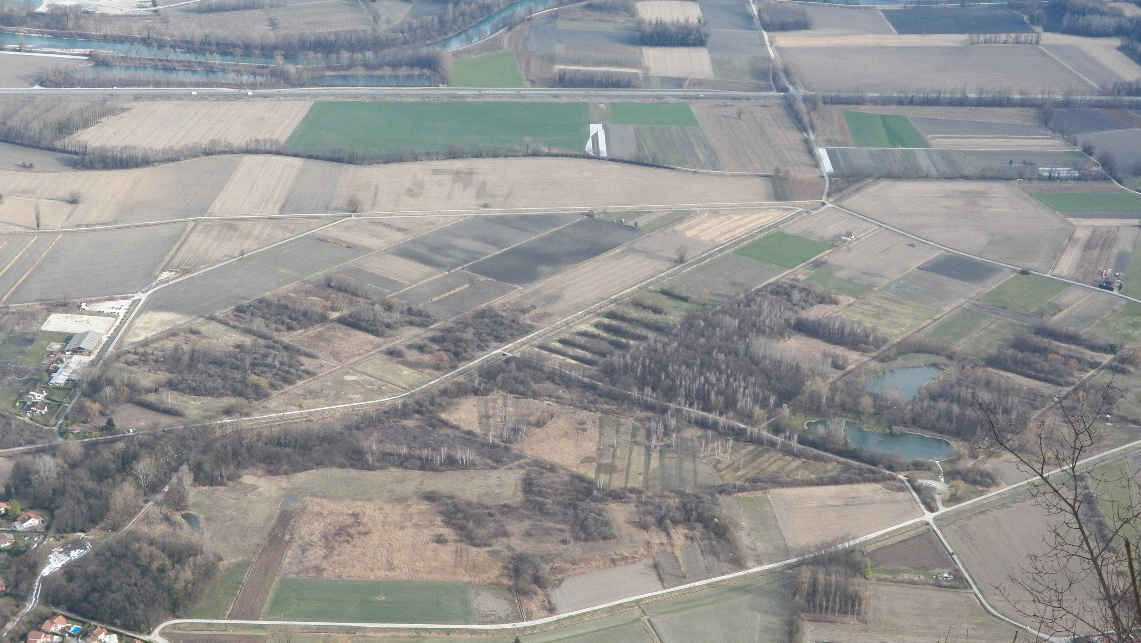 Photographie de marais de Montfort depuis le plateau des Petite Roches